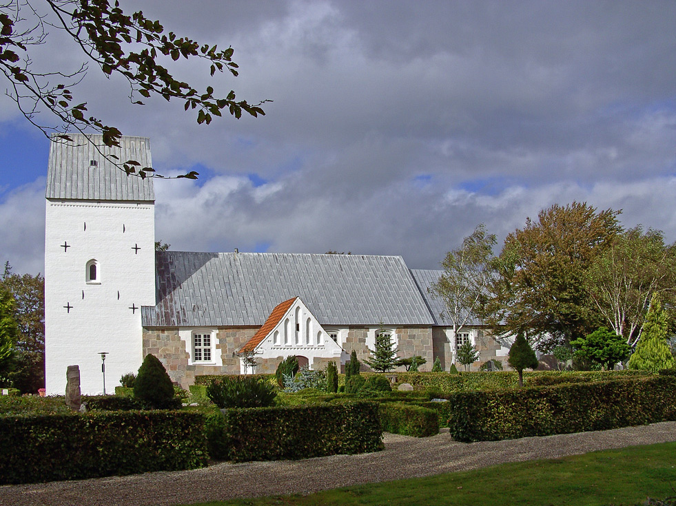 fra syd